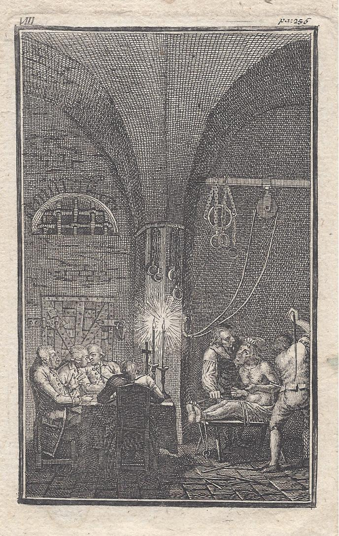 Johann Michael Mettenleiter: Die Untersuchungskommission, Kupferstich um 1790 (Vgl. Franz Heinemann: Der Richter und die Rechtsgelehrten, Eugen Diederichs Verlag, Düsseldorf und Köln, 1900, Abb. 67, S. 69)